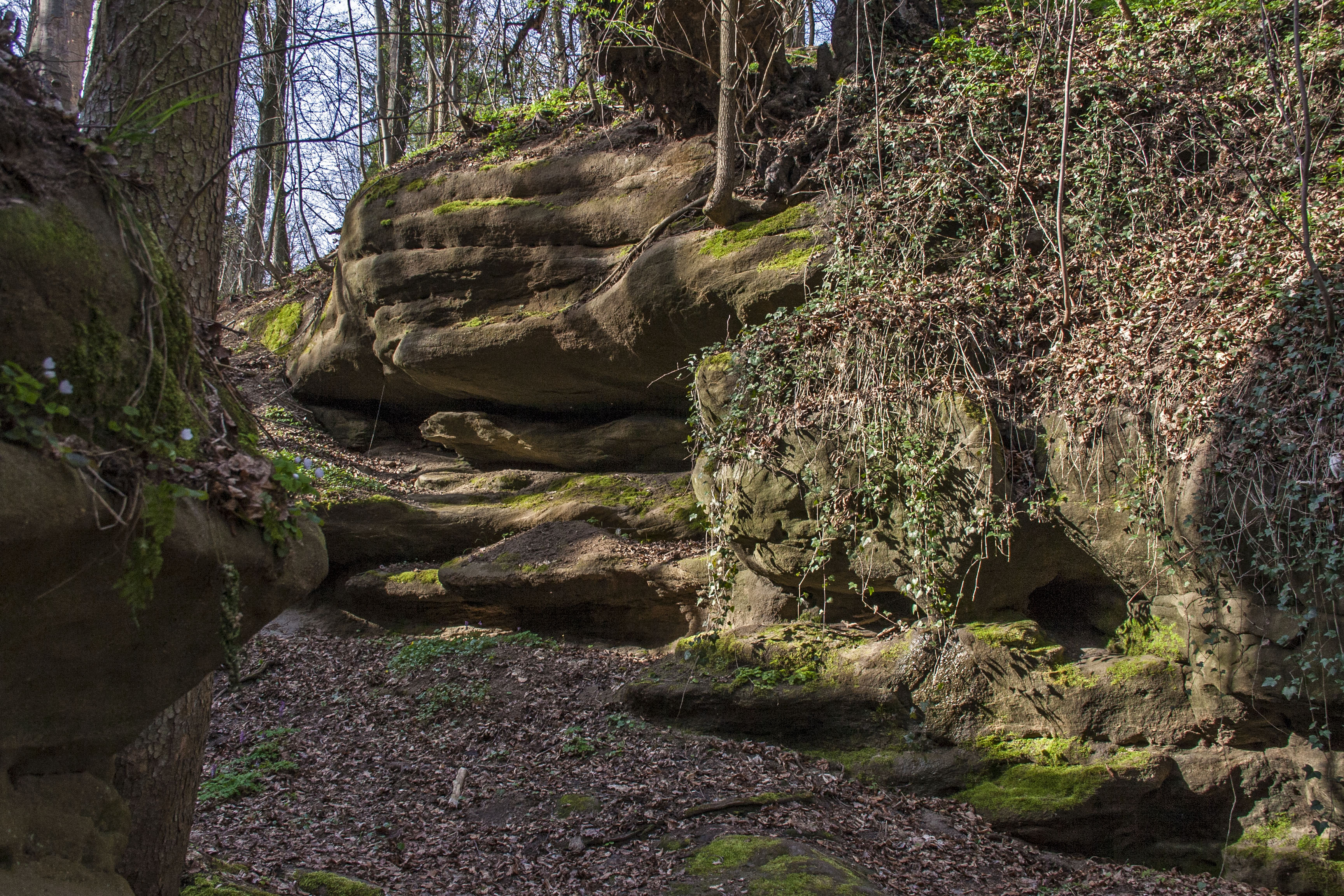 Wolfsschlucht, Geotop, LSG Schwarzachtal mit Nebentälern, Räthsandsteinschlucht, Schlucht, Sandstein